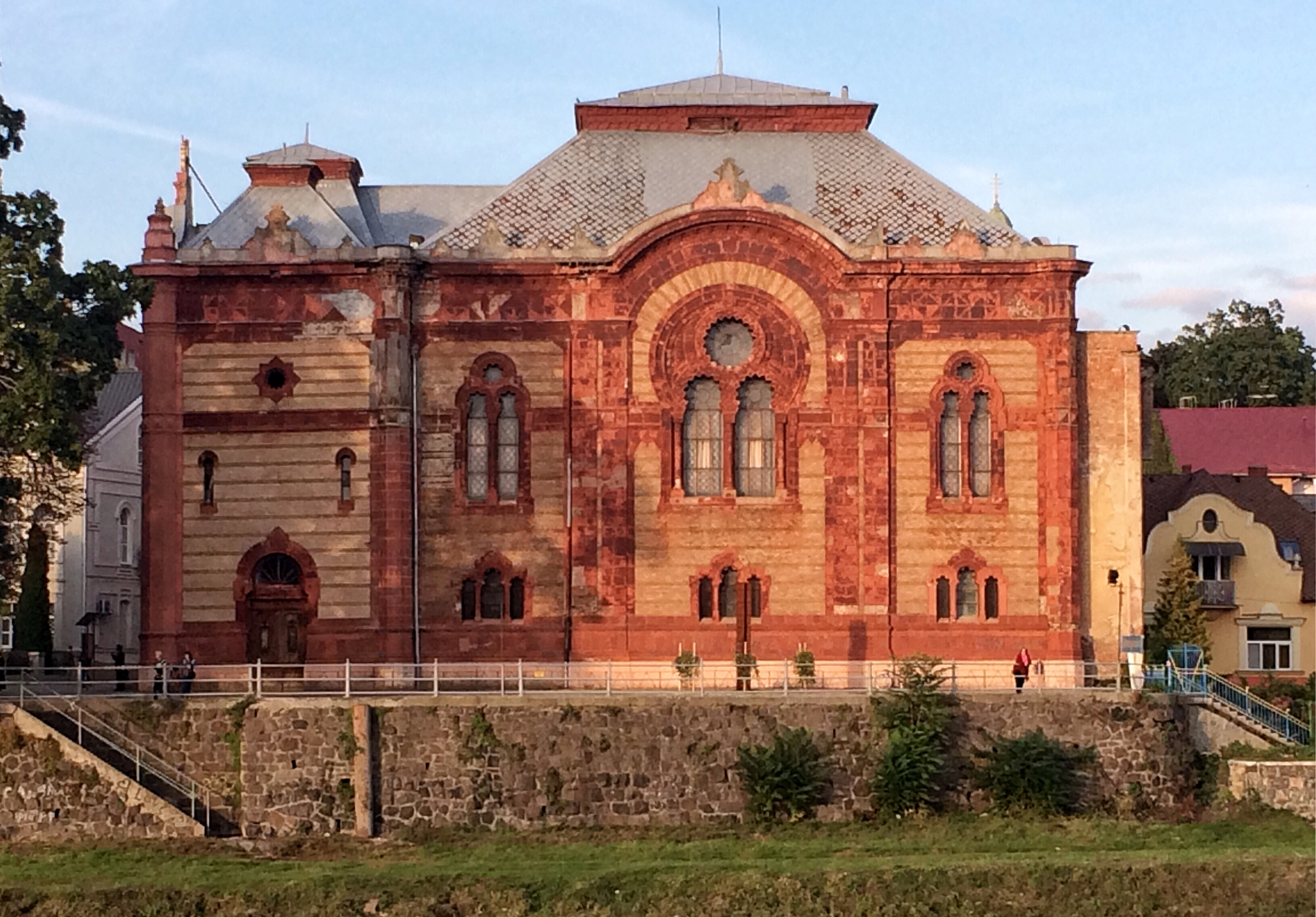 Синагога (мур.), Ужгород, пл. Театральна, 10